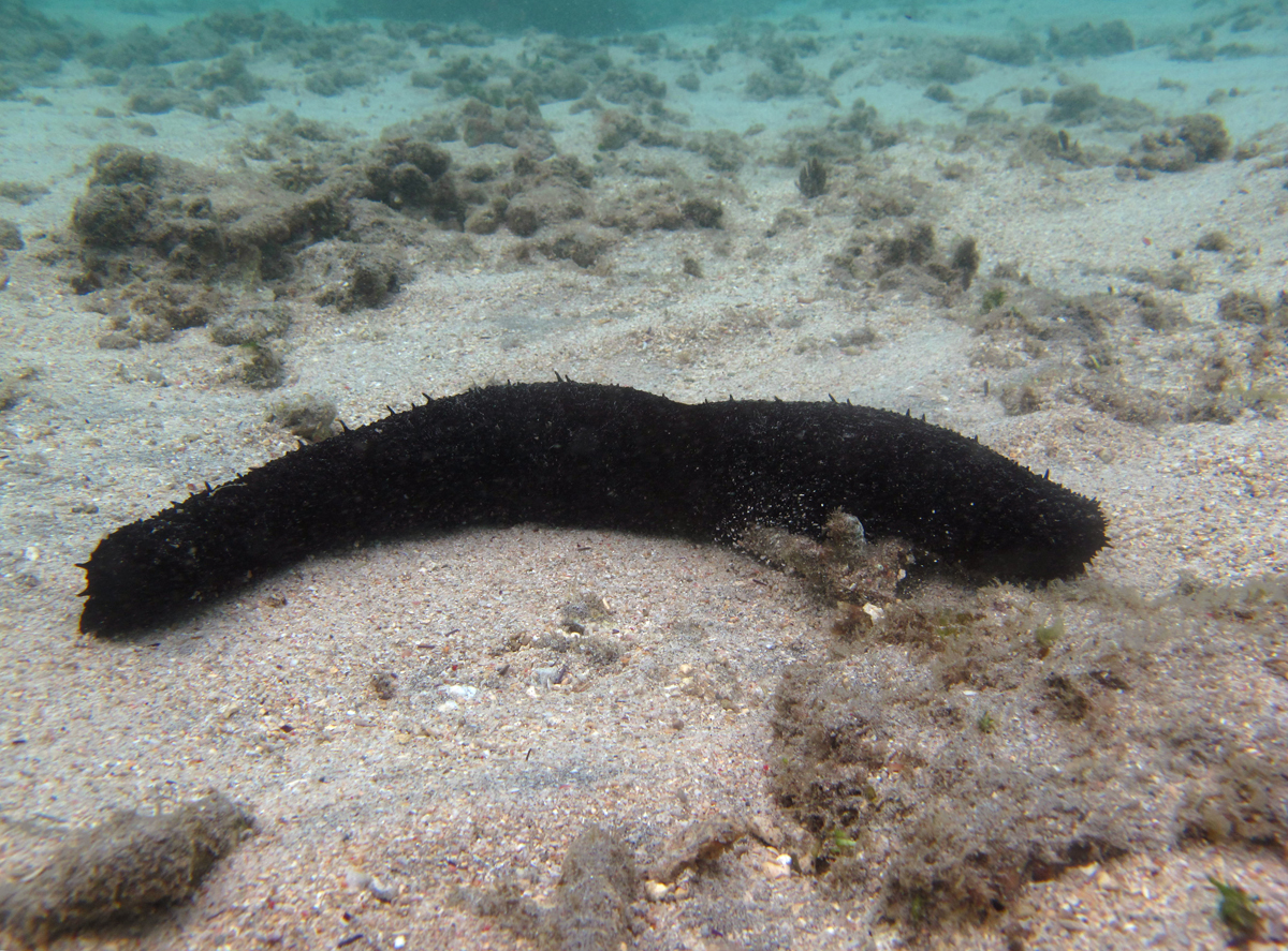 L'holothurie noire Holothuria leucospilota à la Réunion.